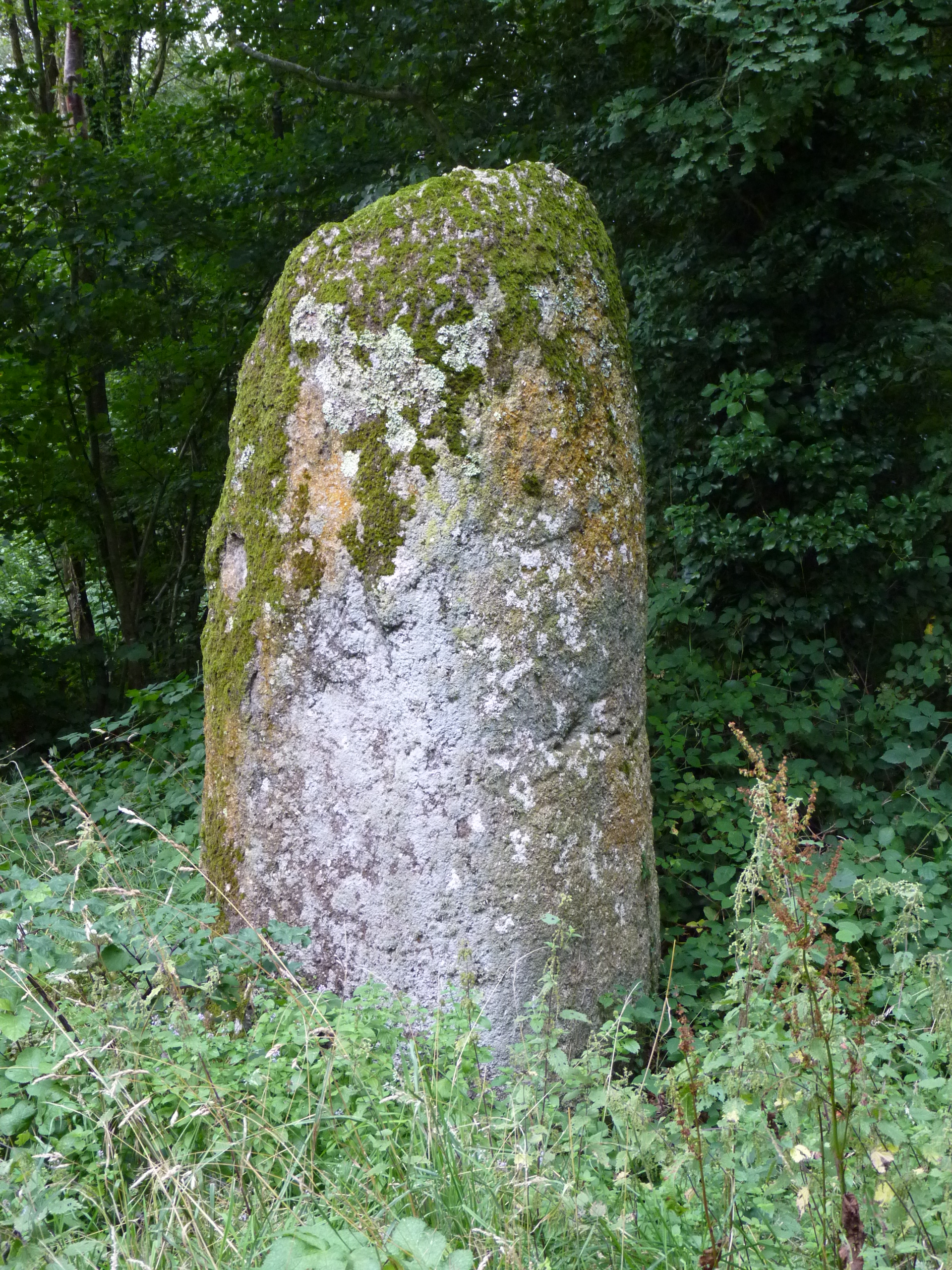 Menhir haut de 3,5 m